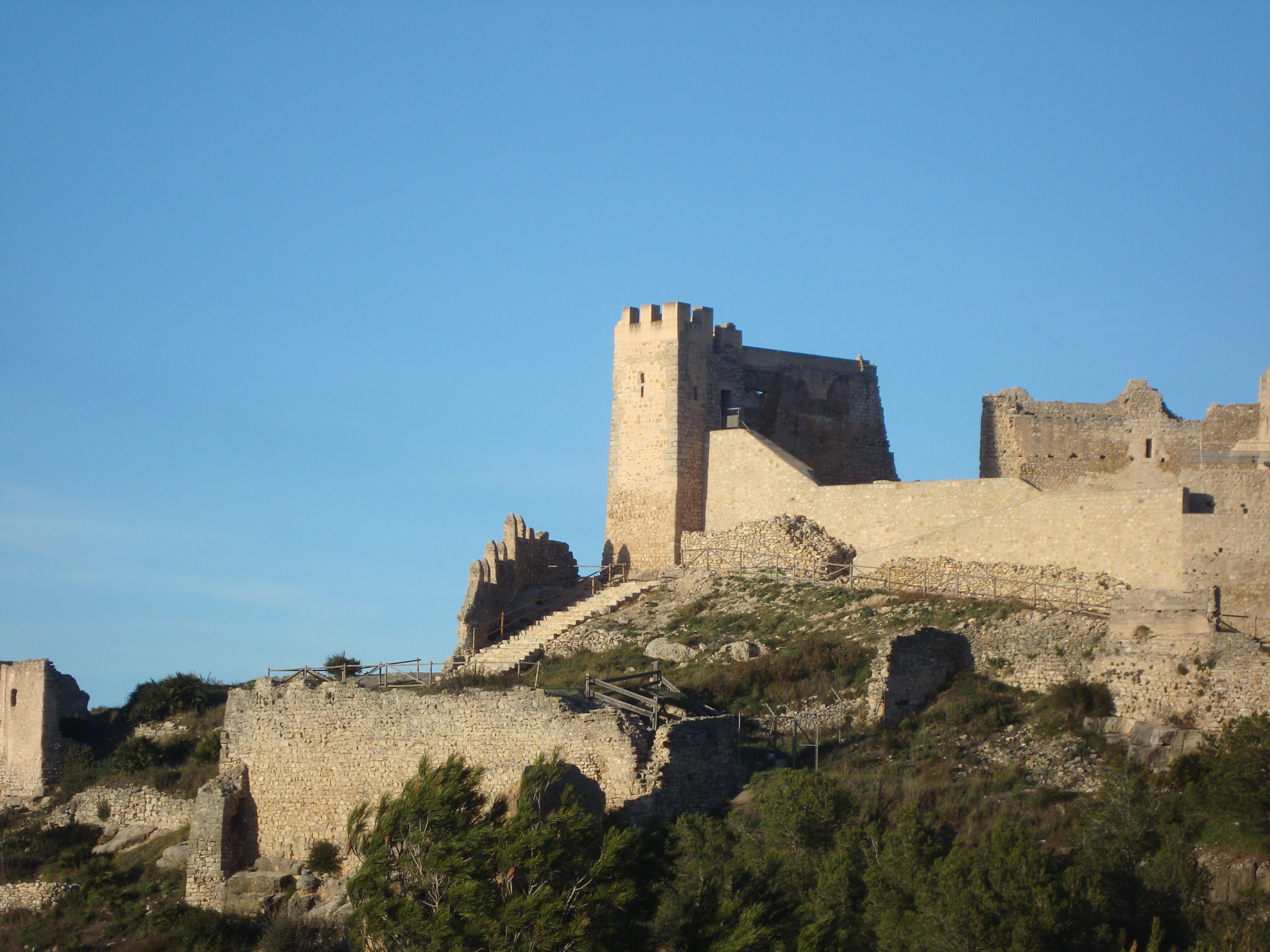 Castell templari de Acalà de Xivert